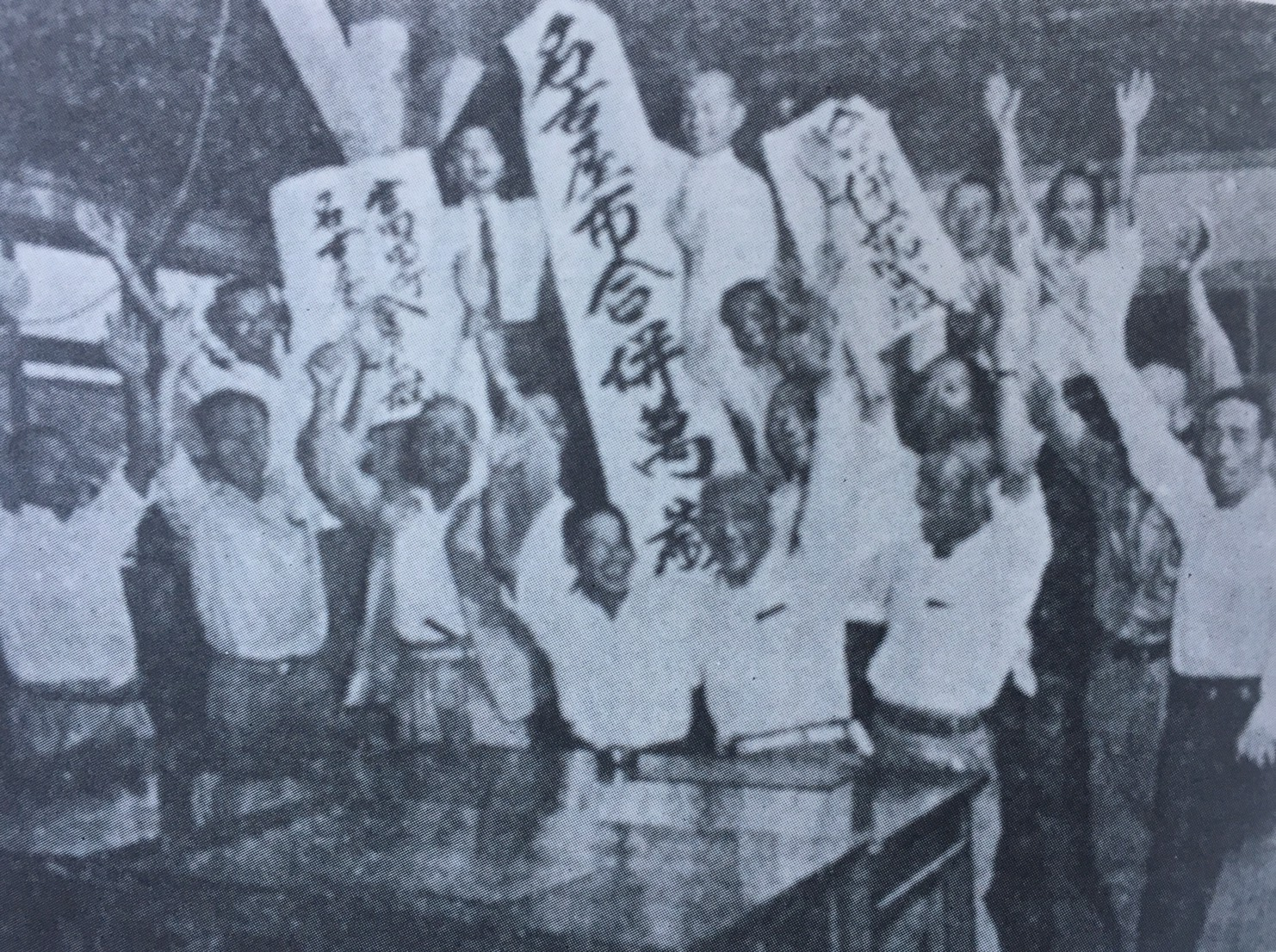 名古屋市合併認可の報に歓喜する富田町民